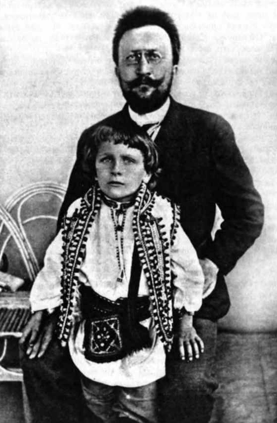 Кирило ТРИЛЬОВСЬКИЙ, засновник січового руху в Галичині, Покутті та Гуцульщині, із сином.